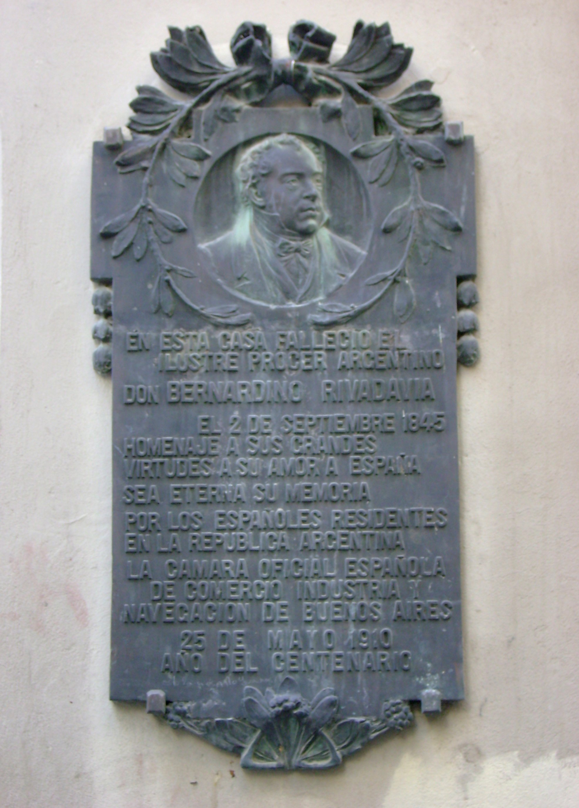 Placa funeraria en honor a Bernardino Rivadavia situada en la casa de su fallecimiento, en la actual calle homónima de la ciudad de Cádiz.